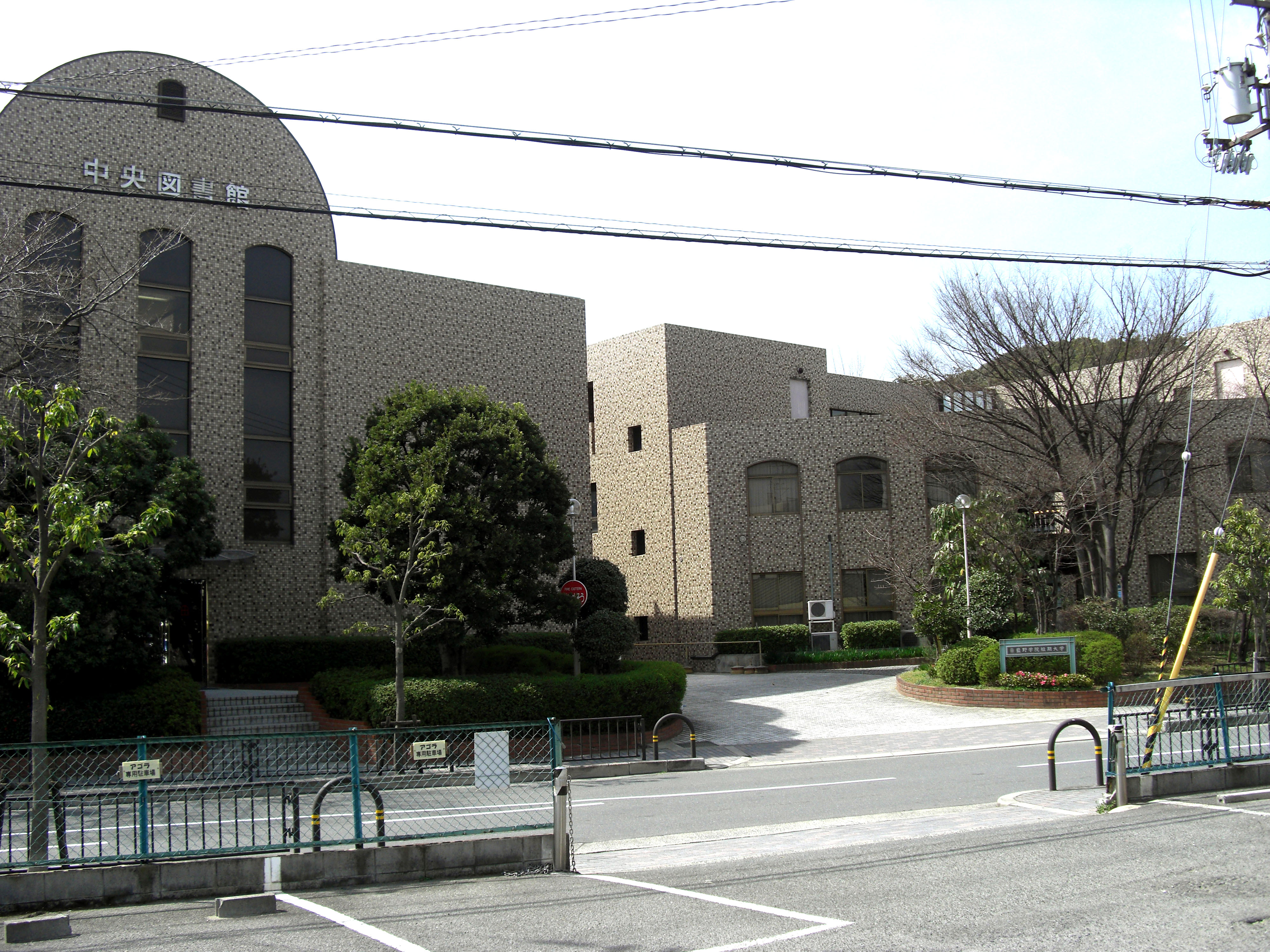 Aino College,Higashioda Ibaraki-City Osaka Japan.